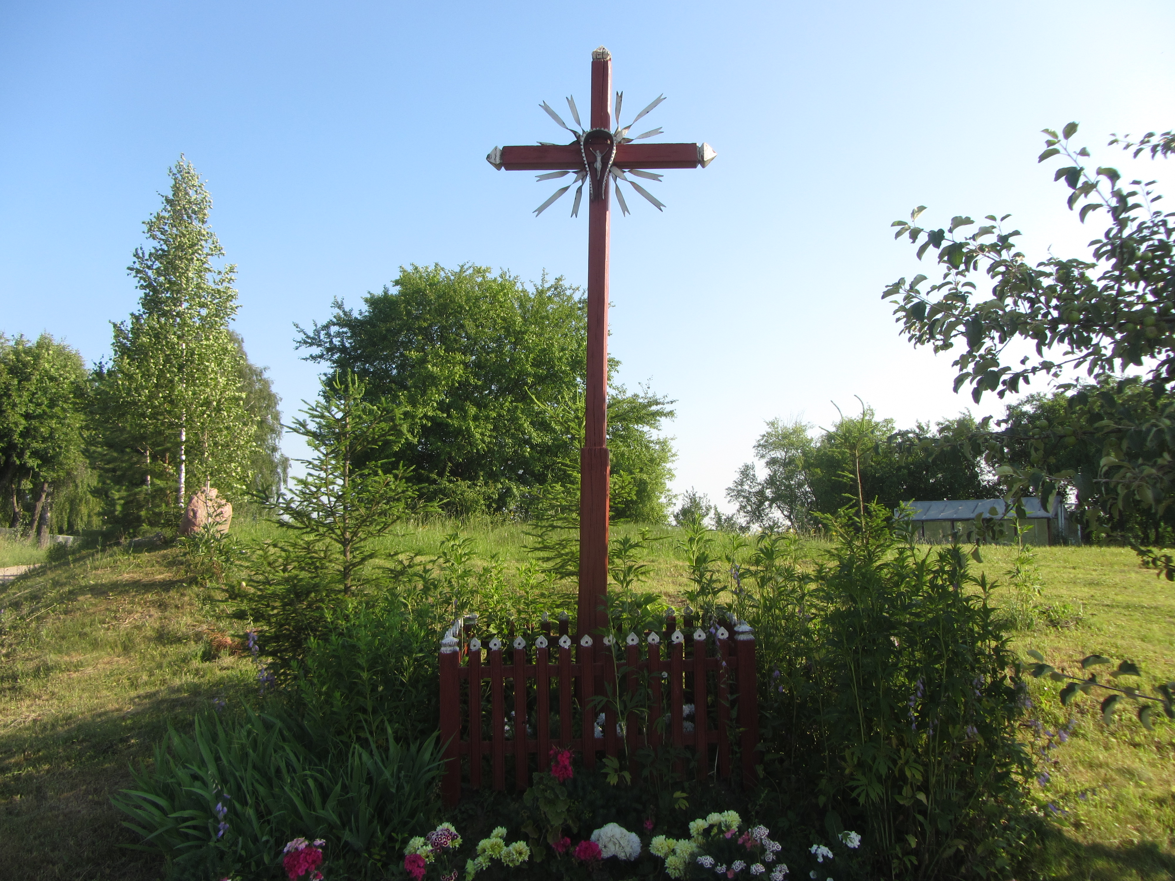 Pupasodis, Lithuania